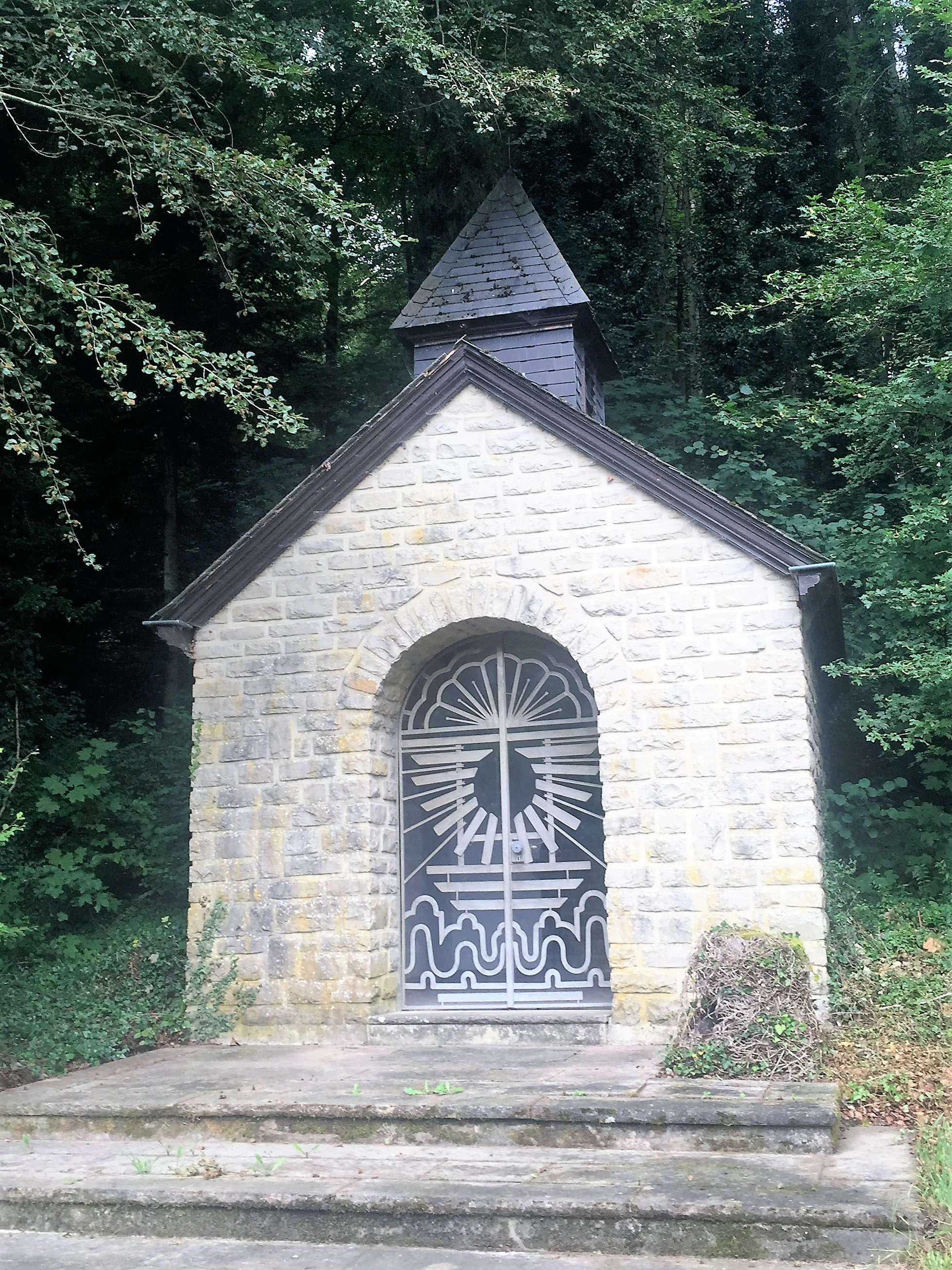 Pequeña capilla junto al camino tras Niedersgegen.